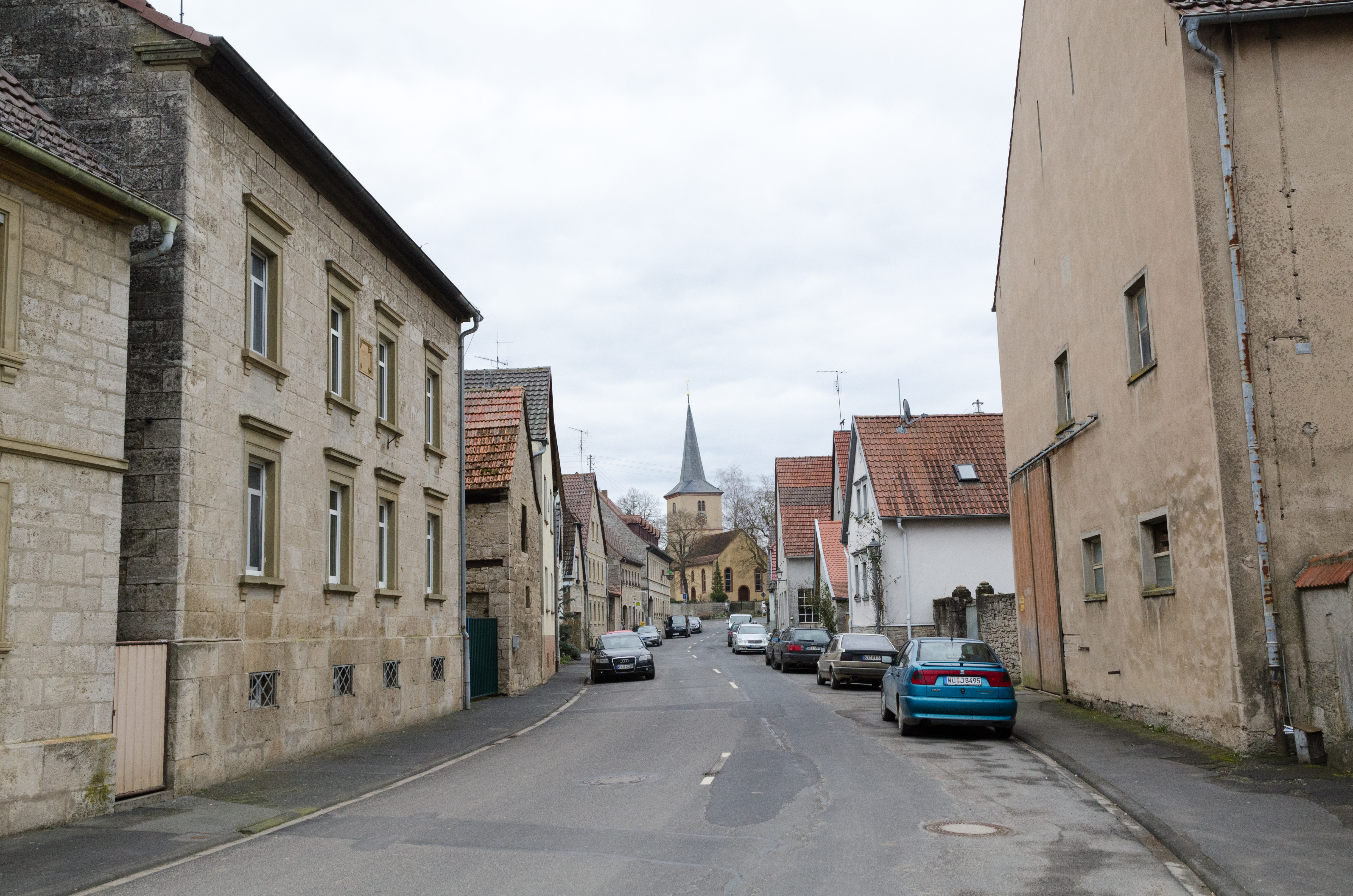 Randersacker, Lindelbach, Lindelbachstraße, West-Ost-Sicht